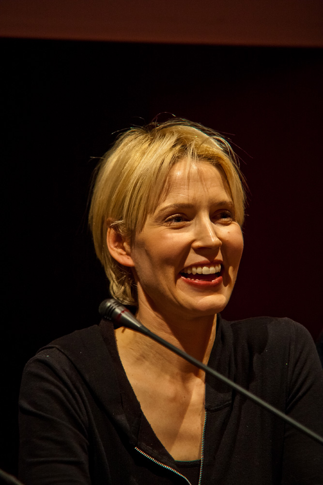 Gaia De Laurentis. Terni 19 Dicembre 2010